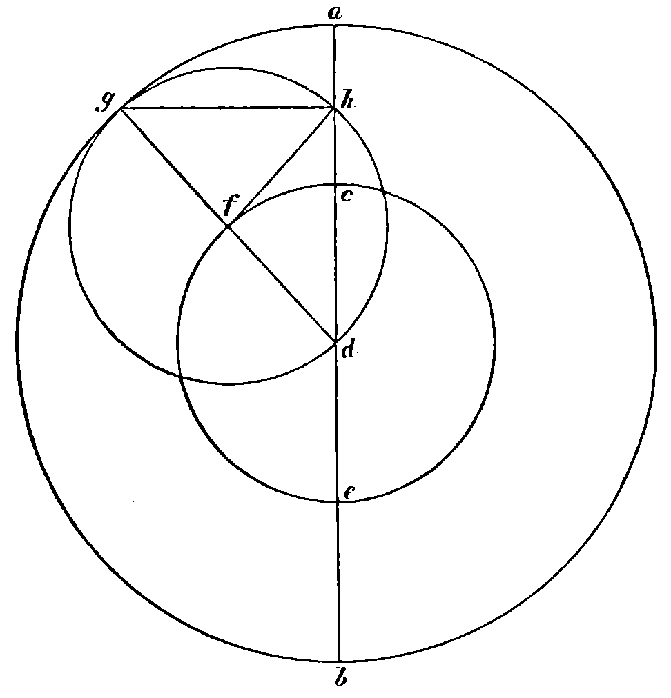 Bewegung der Himmelskörper 42